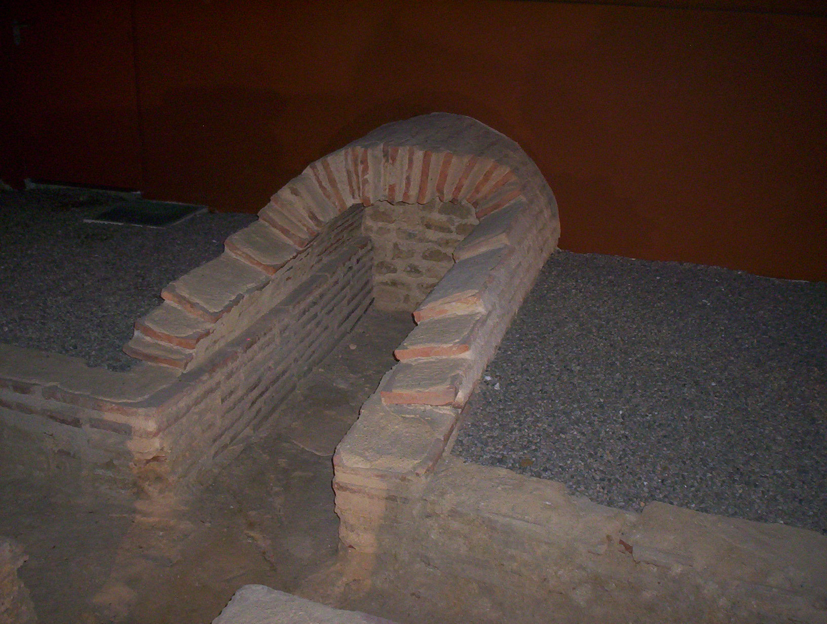 Ancienne voie d'acheminement des eaux pour les thermes de Vindunum au Mans.